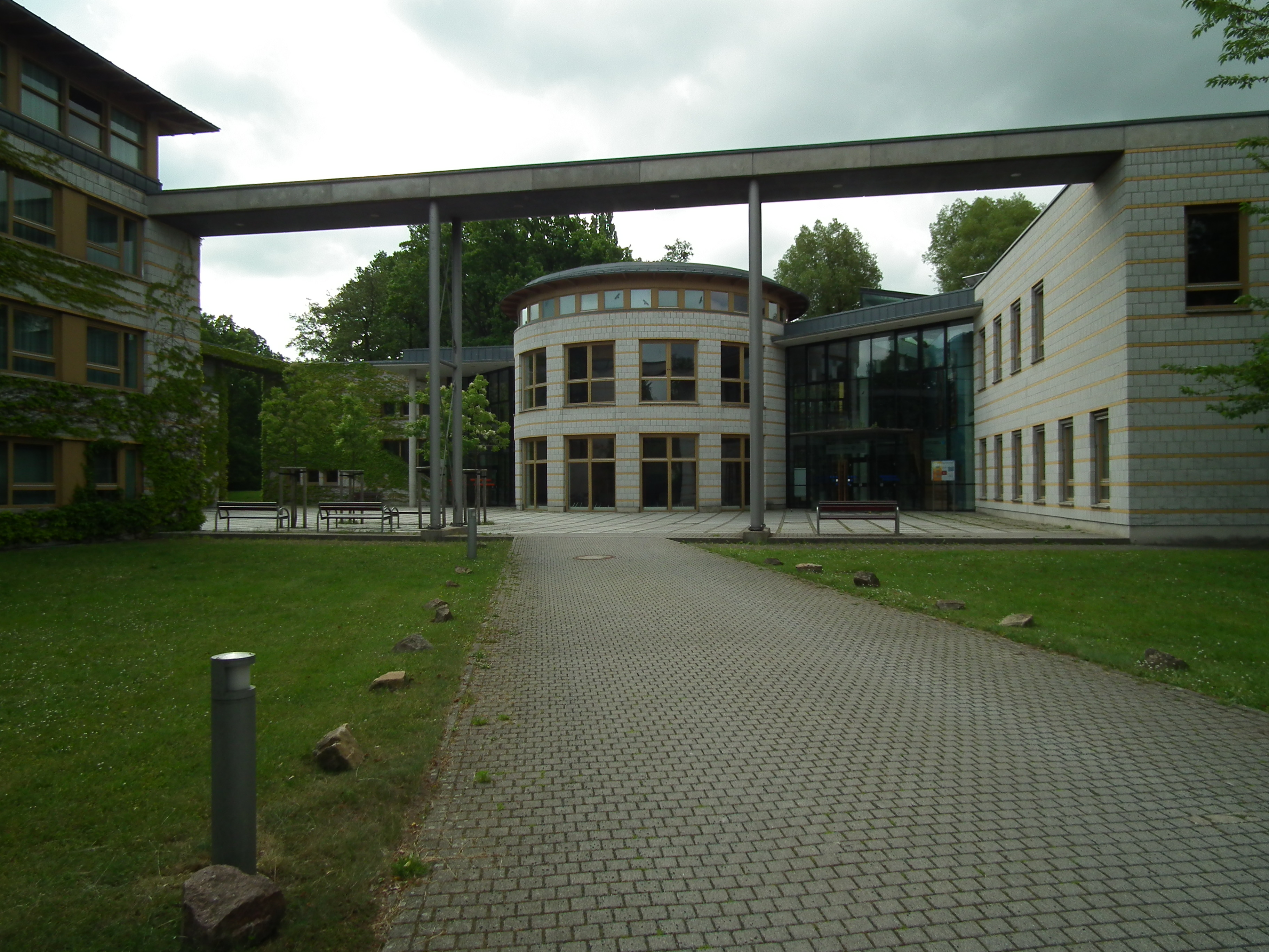 Evangelische Hochschule Moritzburg